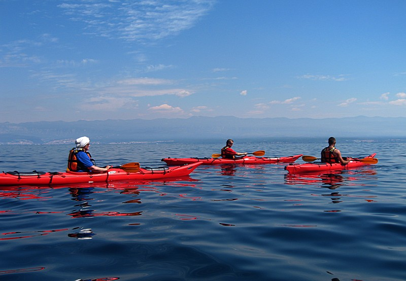 kajak 1